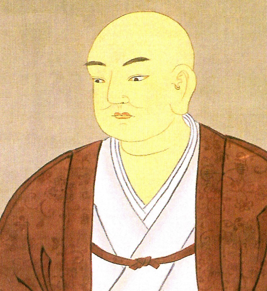 遠山友春の肖像。